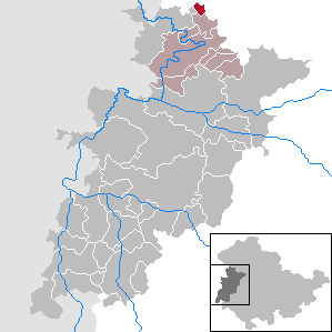 Hallungen in Thuringia - Wartburgkreis